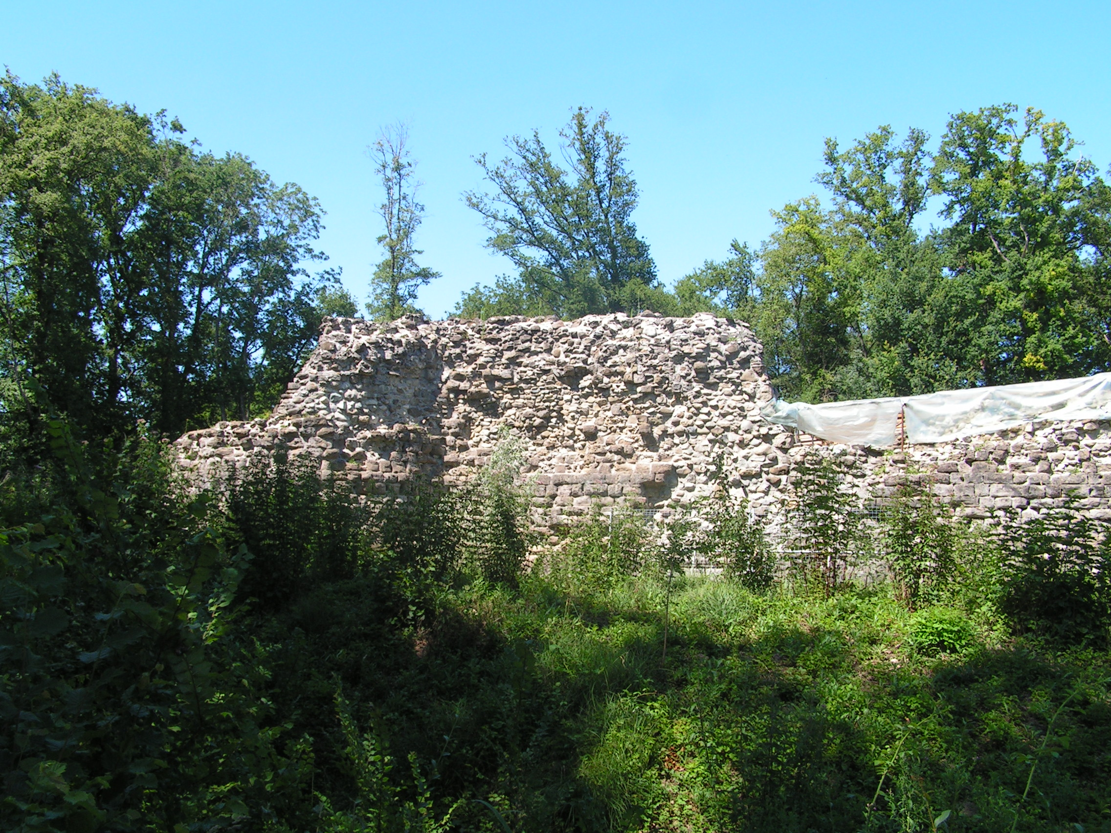 Ruines du Château de Rouelbeau